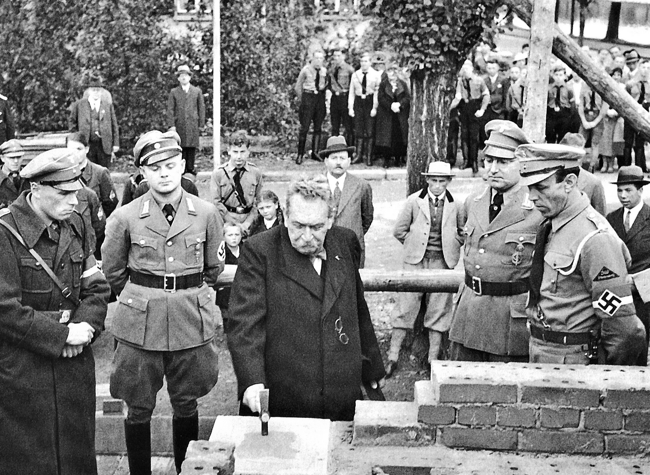 Tübingen. Einmauern des Grundsteins des „Hauses der Jugend“, der heutigen Jugendherberge in der Hermann-Kurz-Straße. In der Mitte Eugen Nägele als Vertreter des Schwäbischen Jugendherbergswerk, links von ihm der Gebietsleiter der Hitlerjugend in Württemberg Erich Sundermann und Kreisleiter des NSDAP Helmut Baumert, rechts der Bürgermeister (und der künftige Oberbürgermeister) Ernst Weinmann.